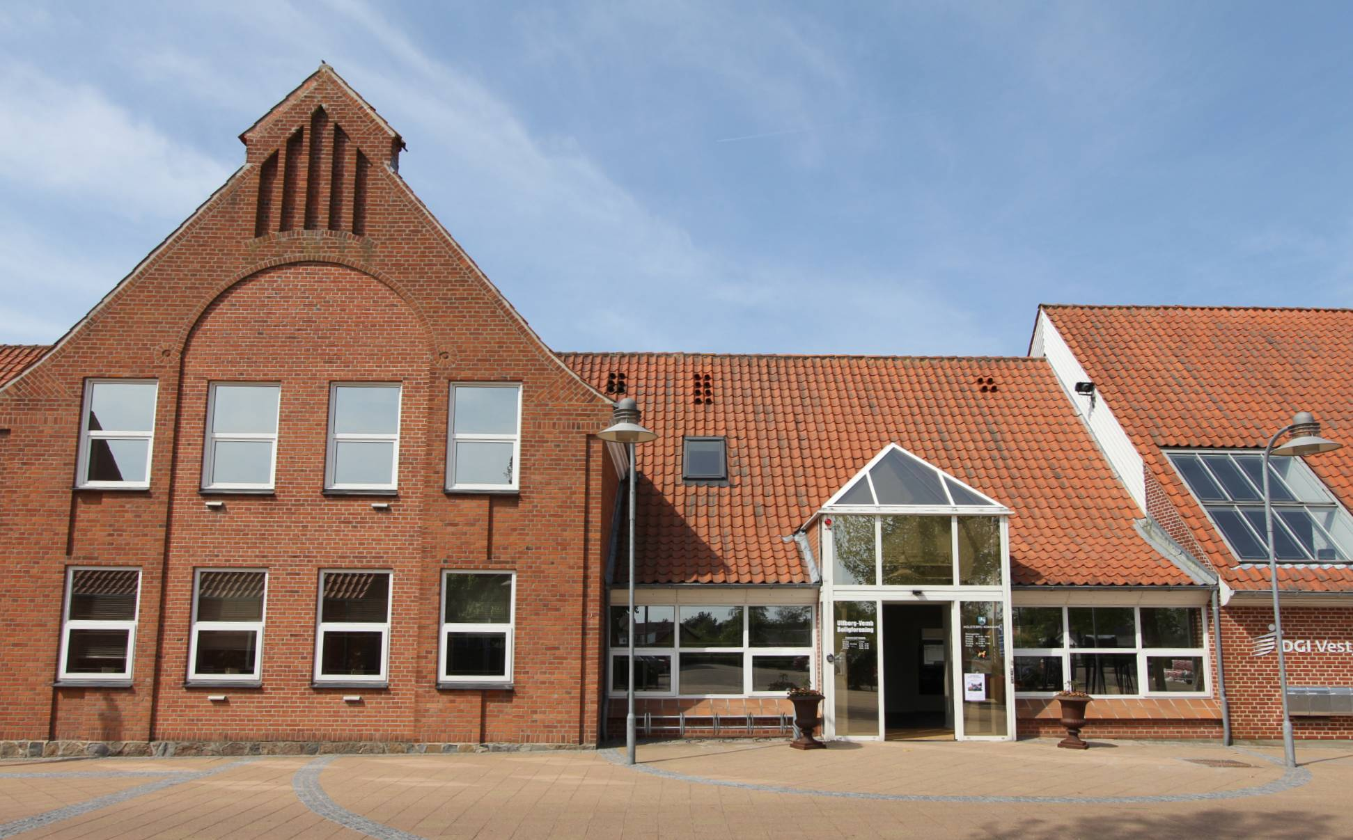 Tinghuset på Tingvej 5 i Ulfborg er det tidligere rådhus i den tidligere Ulfborg-Vemb kommune.